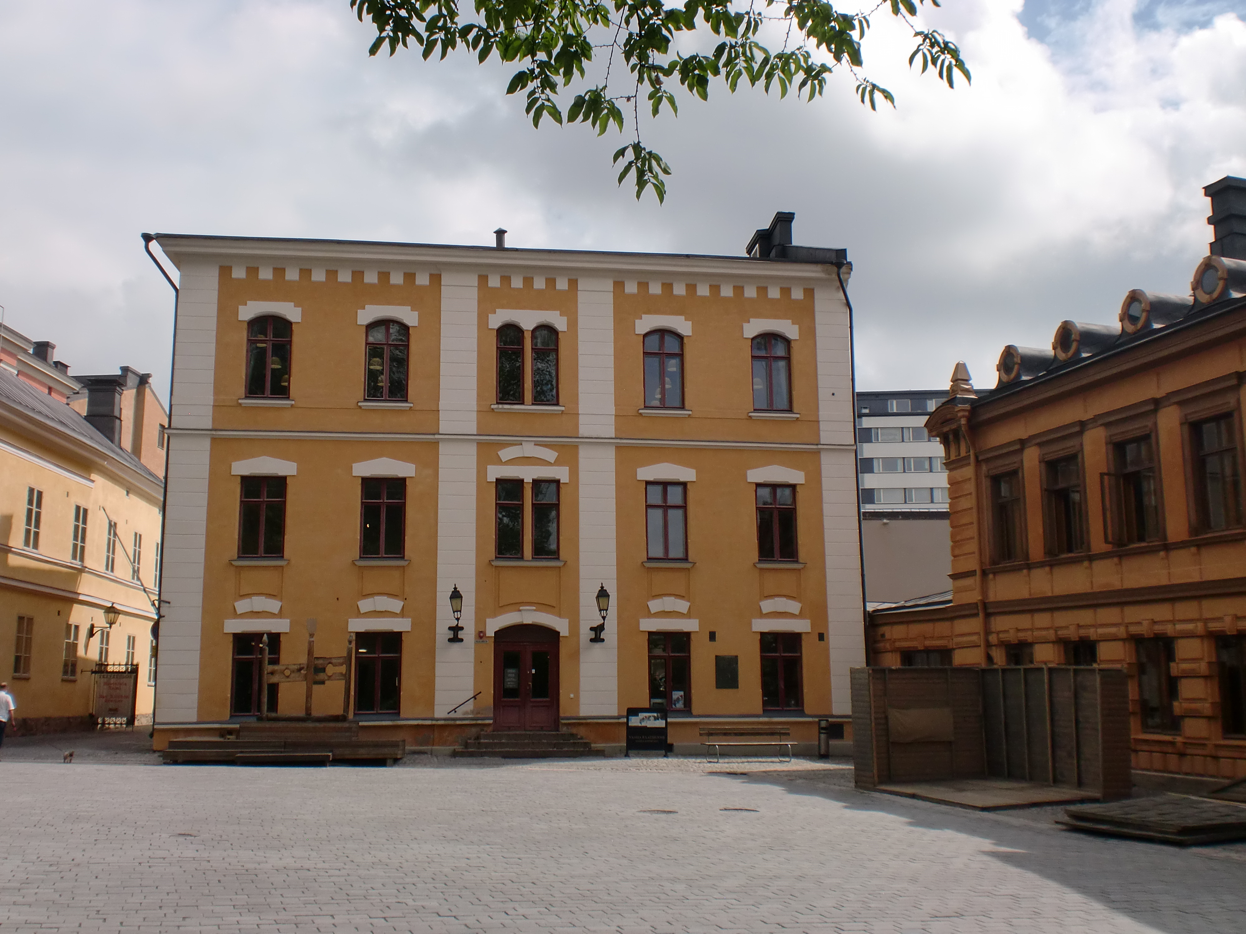 Vanha Raatihuone (Turku)